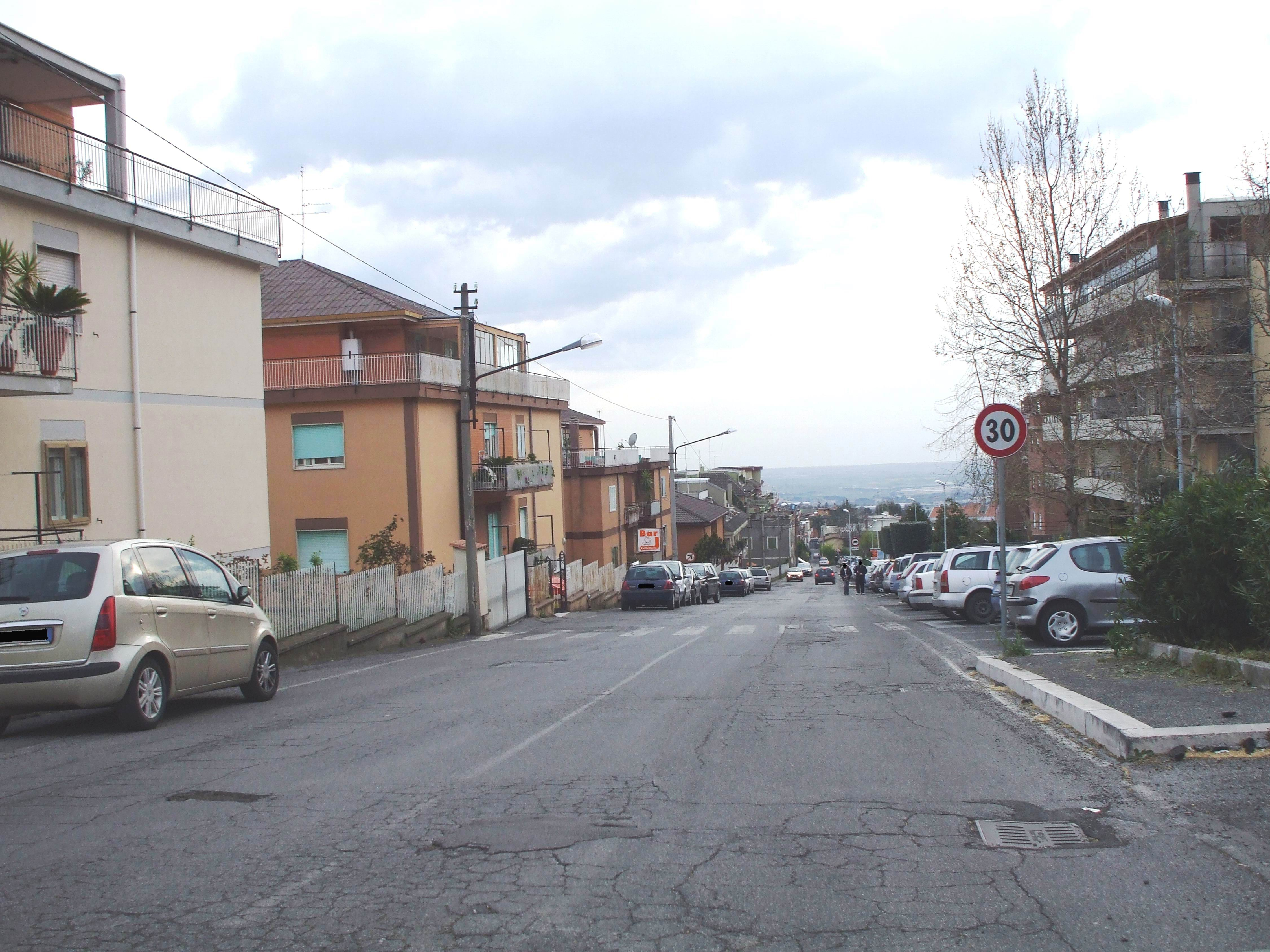 Albano L. ed Ariccia - via Pratolungo - confini comunali